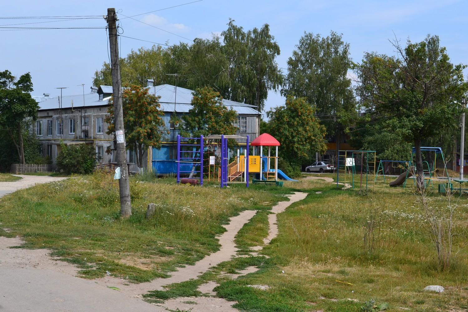 Лямцино